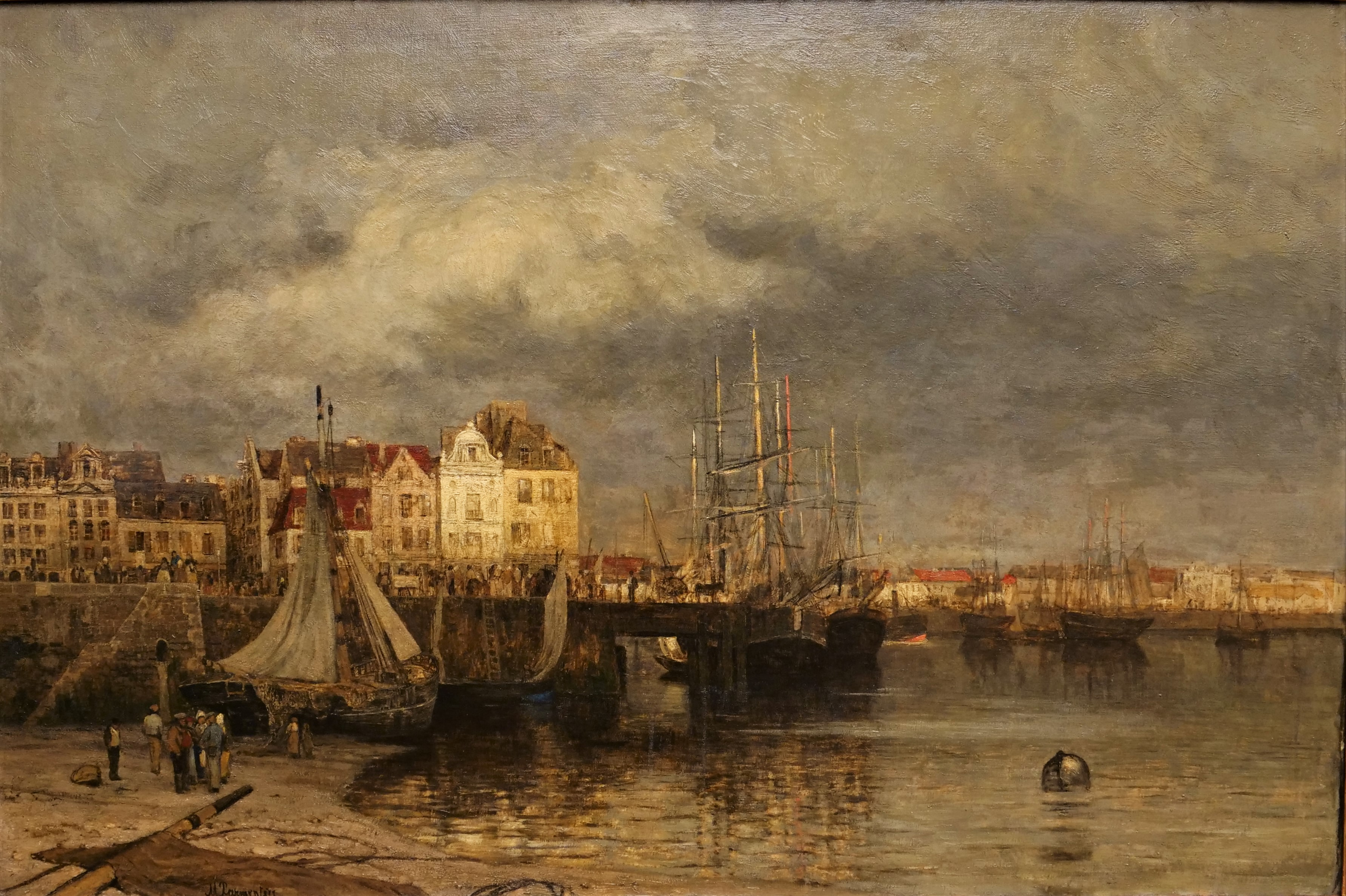 Maria von Parmentier: Der Hafen von Dieppe, vor 1878, Gemälde Öl auf Leinwand, Alte Nationalgalerie